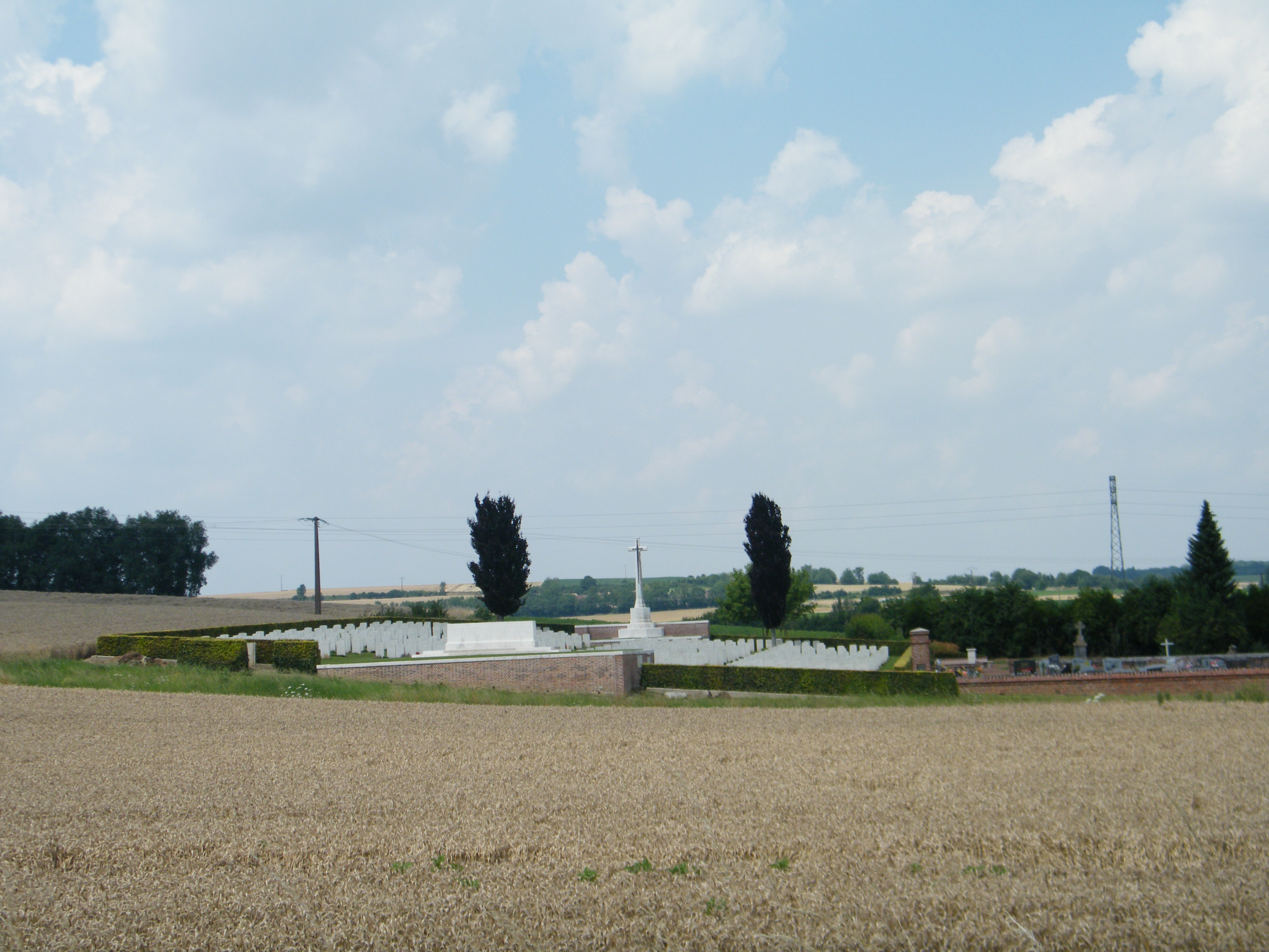 Cimetière militaire britannique, Première Guerre mondiale, 498 tombes.